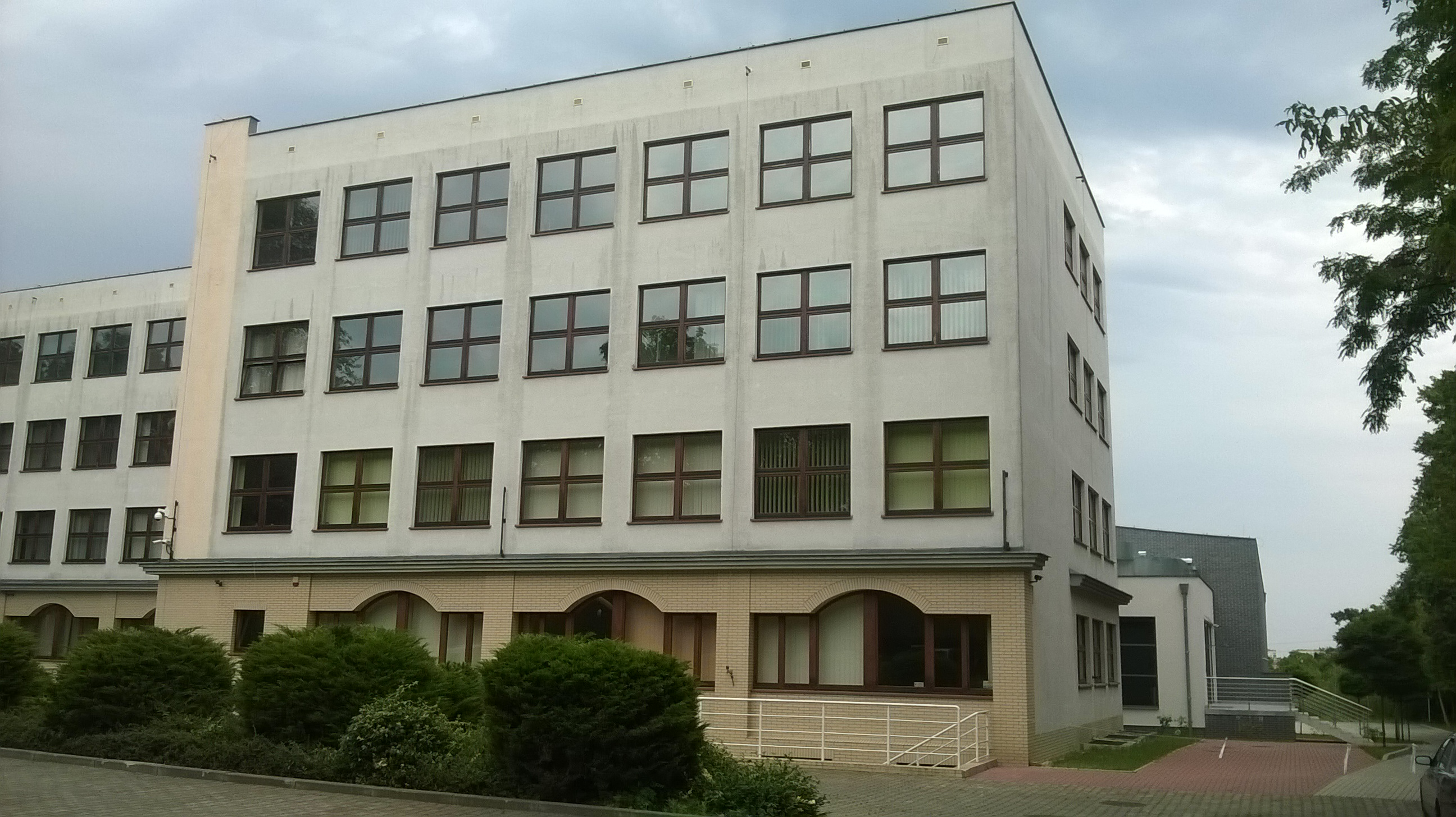 Wydz.Elektr.ZUT-ul.26-kwietnia-nr10-front2